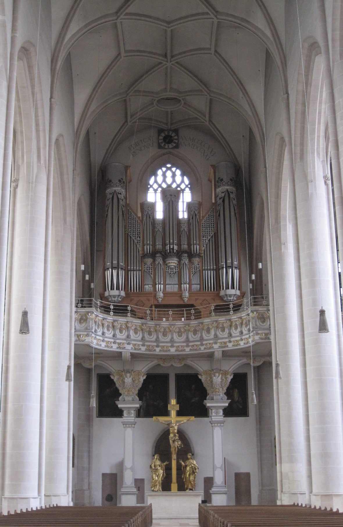 Klais-Orgel des Münsters zur Schönen Unserer Lieben Frau in Ingolstadt